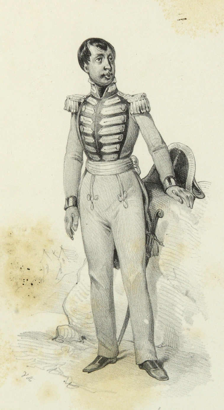 Créateur principal : Adam, Victor (1801-1886) Source / N° d'inventaire : 2003.7.1.1 Millésime / Période : Avant 1840 Format / Mesure : 21 x 13 cm (im.) Type de document : Estampe Editeur / Imprimeur : Paris : L. Desessart Relation : Voyage à Madagascar et aux Iles Comores... / [par B.-F. Leguével de Lacombe], t. 1, front. Titre : III, Radama, roi des hovas Lieu de conservation : Musée historique de Villèle Langue : Français Droits : Conseil général de La Réunion, Musée de Villèle, droits réservés Notice complète : III, Radama, roi des hovas / V. A[dam] [del.]. - Paris : L. Desessart, [avant 1840]. - 1 est. ; 21 x 13 cm (im.). Dans : "Voyage à Madagascar et aux Iles Comores..." / [par B.-F. Leguével de Lacombe], t. 1, front. Matière